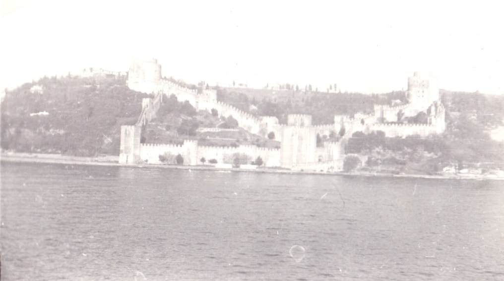 Старая крепость в Стамбуле (1978)